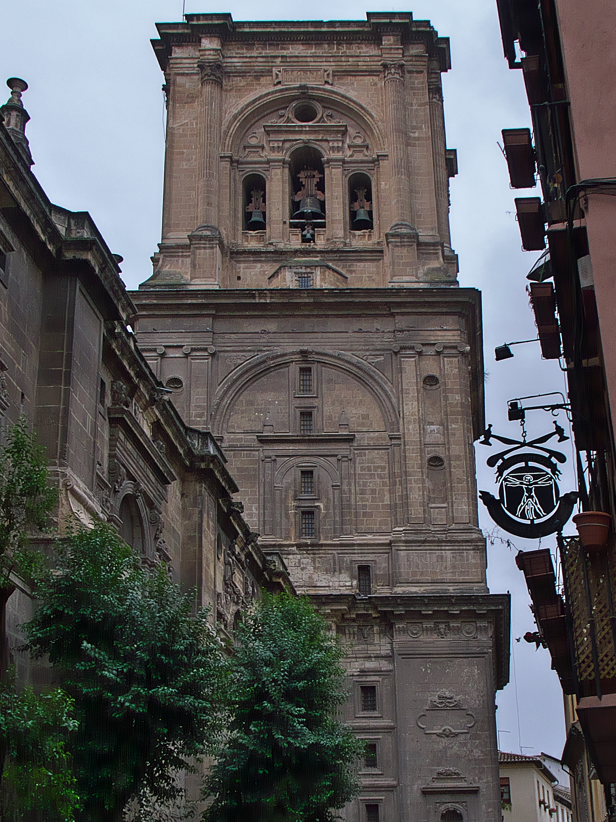 Una de las dos torres proyectadas por Diego de Siloé. Juan de Maeda y Ambrosio Vico continuarían la inacabada obra (h. 1589)